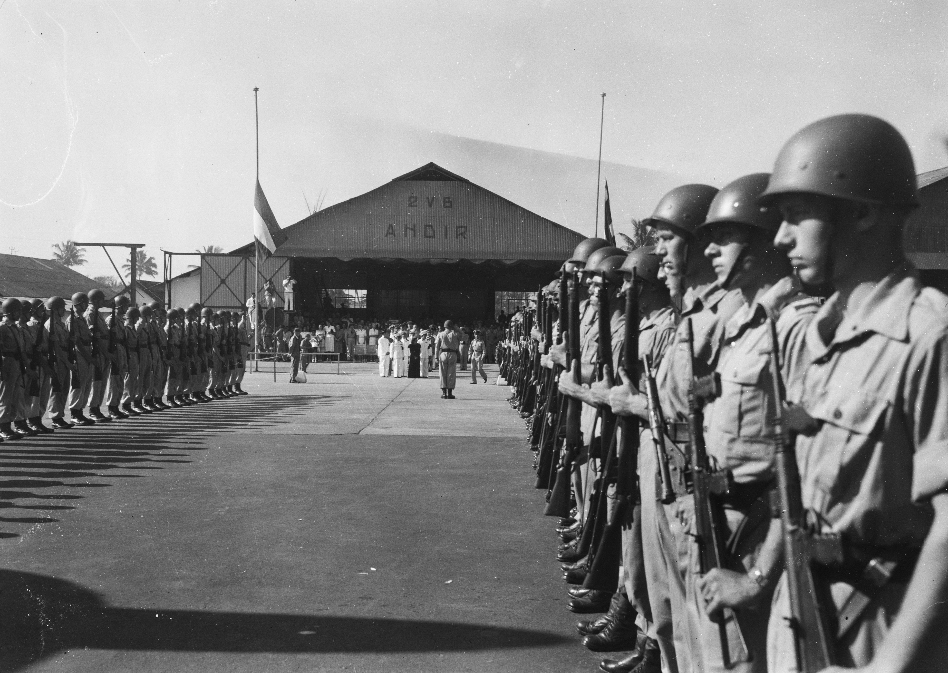 Collectie / Archief : Fotocollectie Dienst voor Legercontacten Indonesië Reportage / Serie : [DLC] Overbrenging stoffelijk overschot Siamese prins Paribatra Beschrijving : Op 28 sept. werd het stoffelijk overschot van Prins Paribatra van Siam, die gedurende de Japanse bezetting te Bandoeng was overleden, per KLM-constellation naar Siam teruggebracht. Hiertoe was een speciale Missie uit Siam, bestaande uit Hoogwaardigheidsbekleders, w.o. kroonprins Chumbhot, prins Bandhuma, de echtgenote van de overledene, prinses Siriratma en vele andere hoge autoriteiten naar Indonesie gekomen, teneinde de overleden prins op zijn laatste reis te begeleiden. Datum : 28 september 1948 Locatie : Indonesië, Nederlands-Indië Fotograaf : Haasjes / DLC Auteursrechthebbende : Nationaal Archief Materiaalsoort : Negatief (zwart/wit) Nummer archiefinventaris : bekijk toegang 2.24.04.03 Bestanddeelnummer : 14546